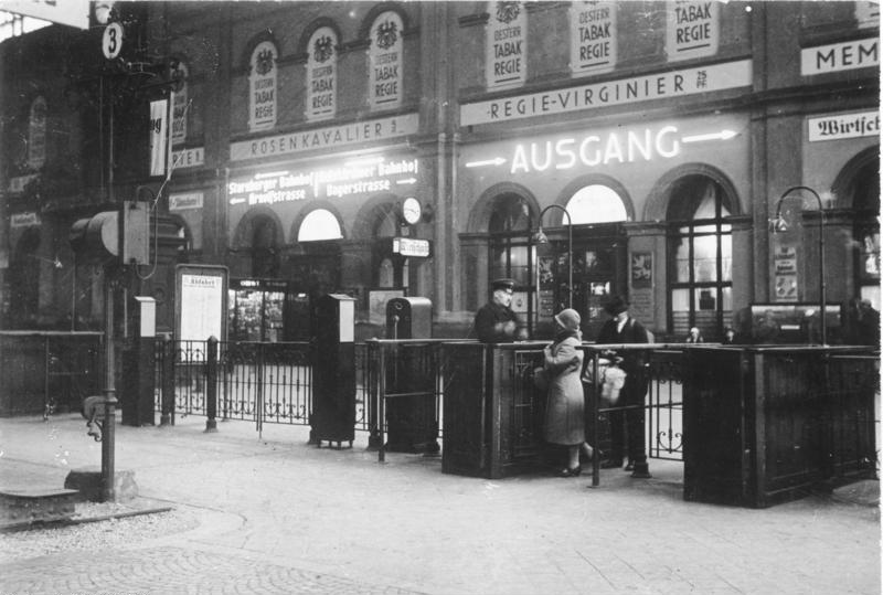 München, Schalterhalle des Hauptbahnhofs Scherl: Der Münchener Hauptbahnhof um 1930